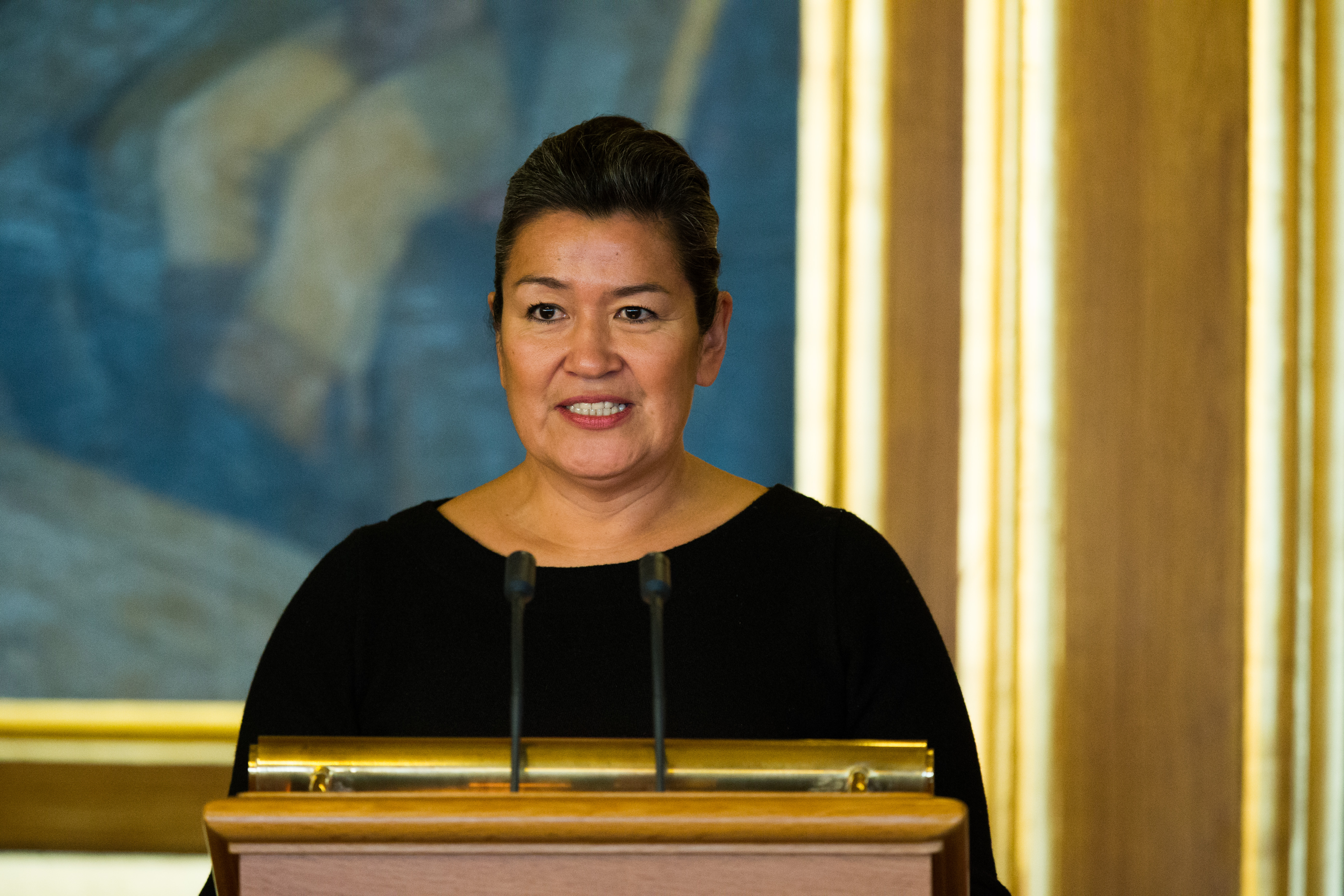 Aleqa Hammond, Landsstyreformand Grønland